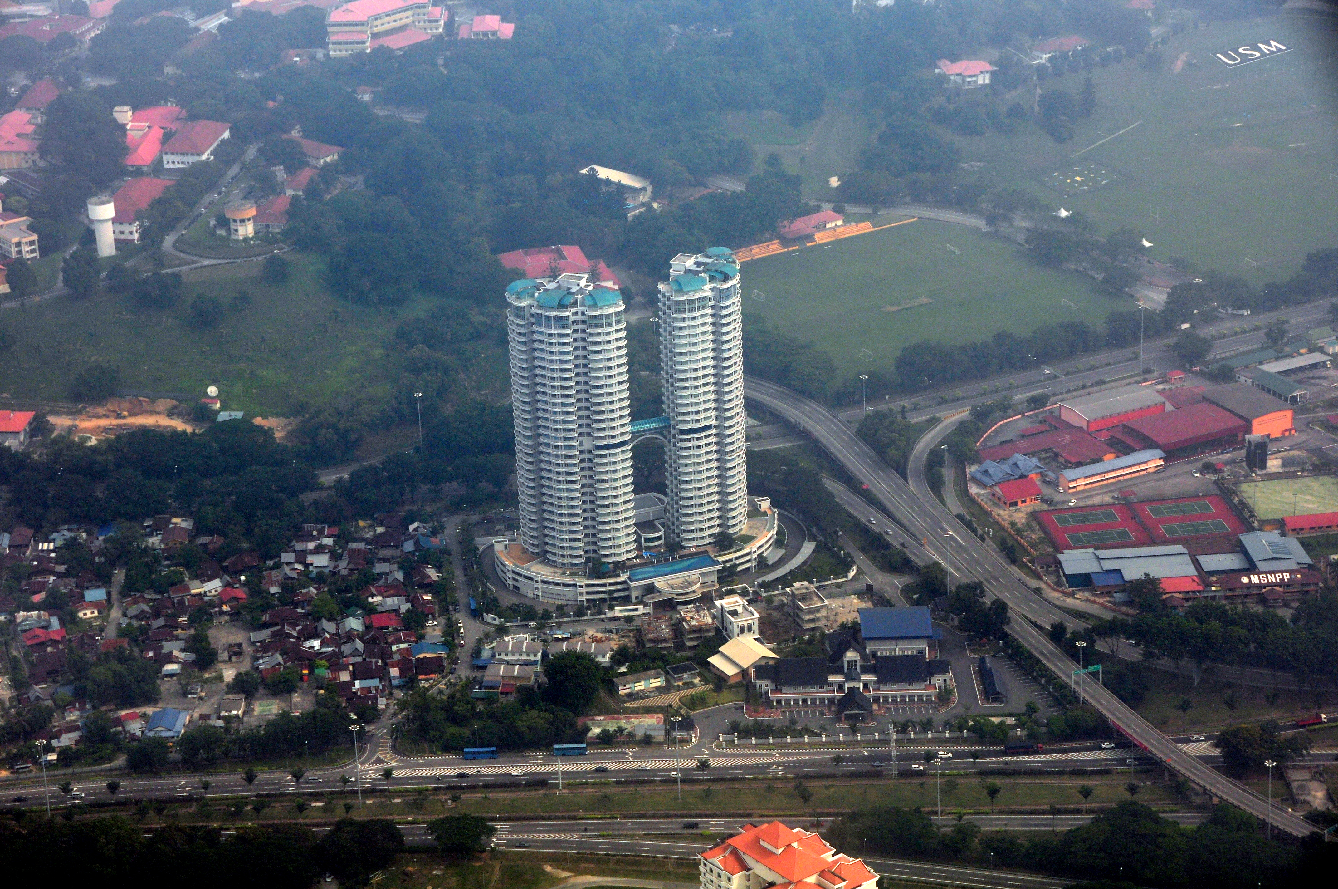 Gelugor